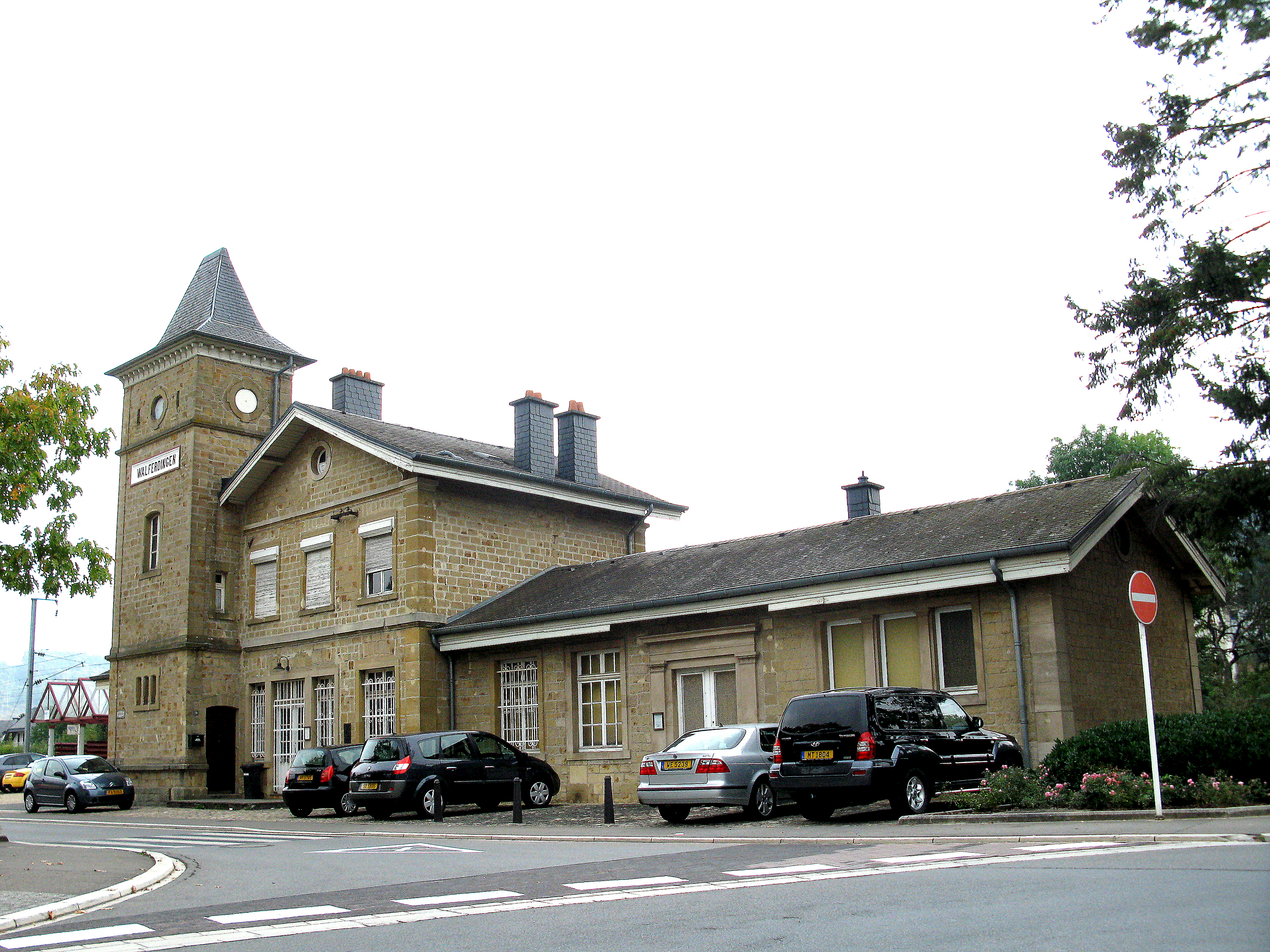 D'Gare vu Walfer